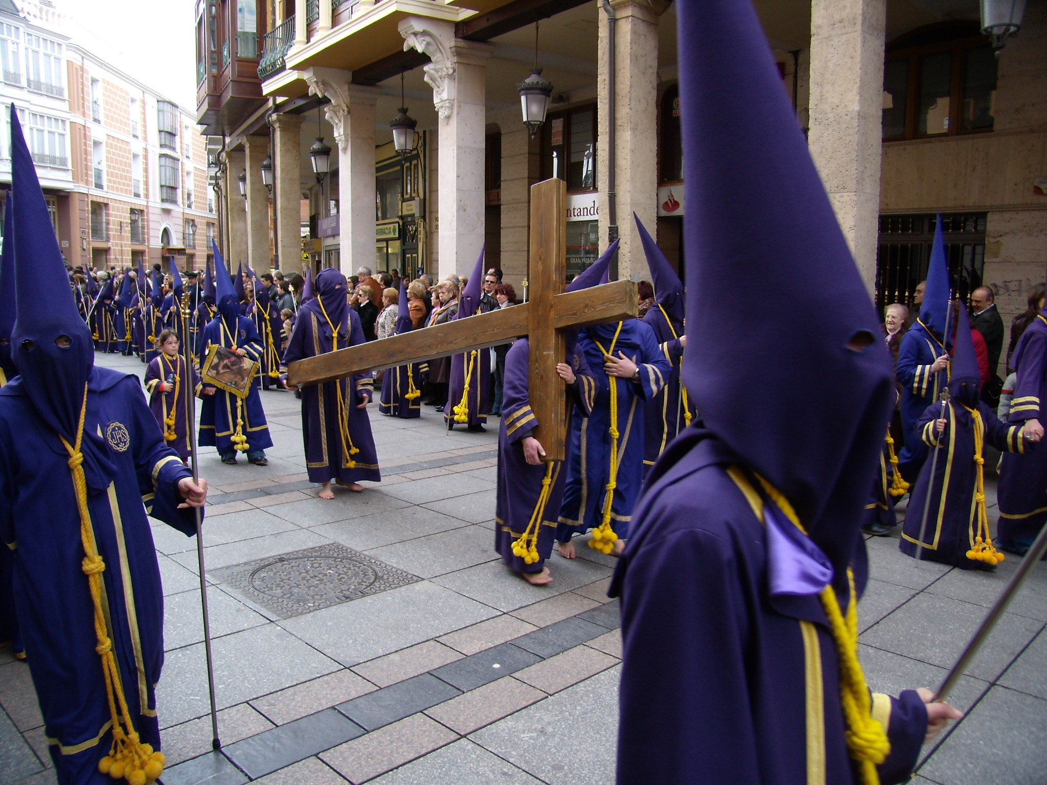 Procesión de los Pasos el Viernes Santo en Palencia. Organizada por la Cofradía Penitencial de Nuestro Padre Jesús Nazareno y Nuestra Madre la Virgen de la Amargura.